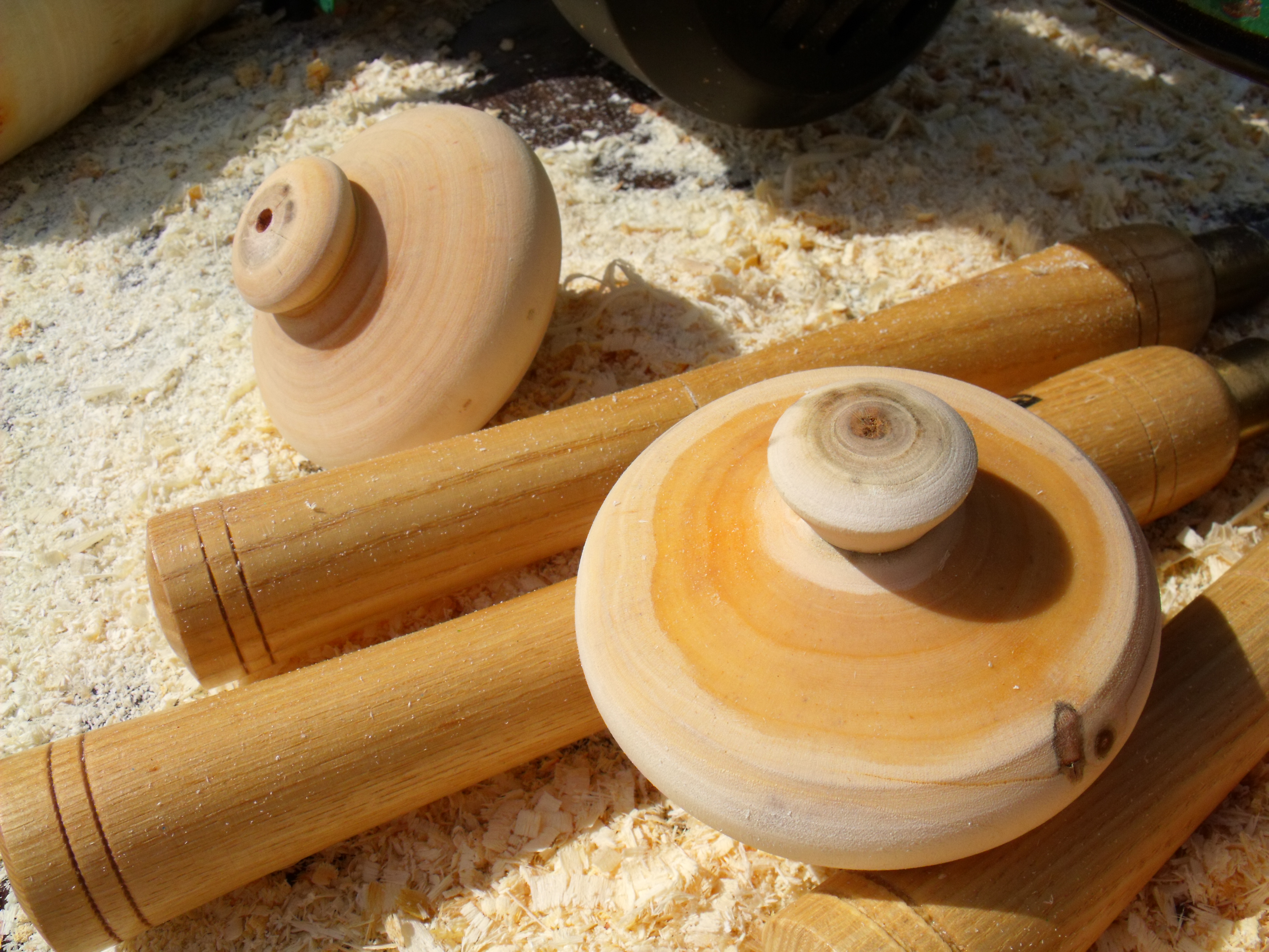 Two Malay style gasings.